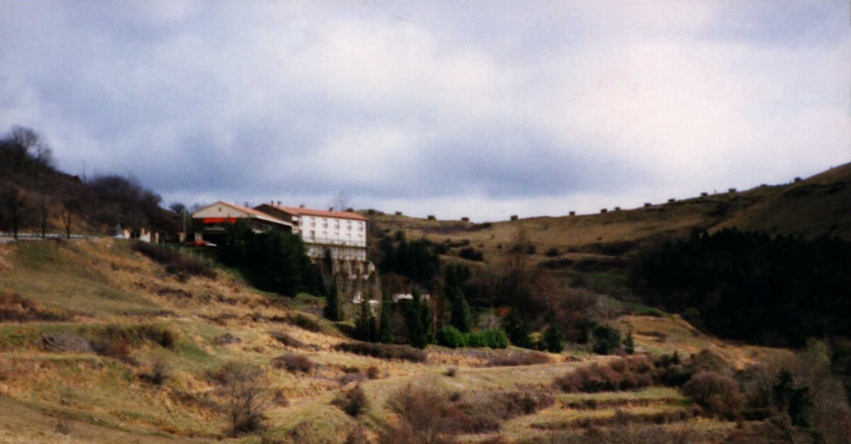 Au col de l'Escrinet, en mars 1992 : barrant le col, les affuts des chasseurs au pigeon ramier, se détachent sur le ciel.